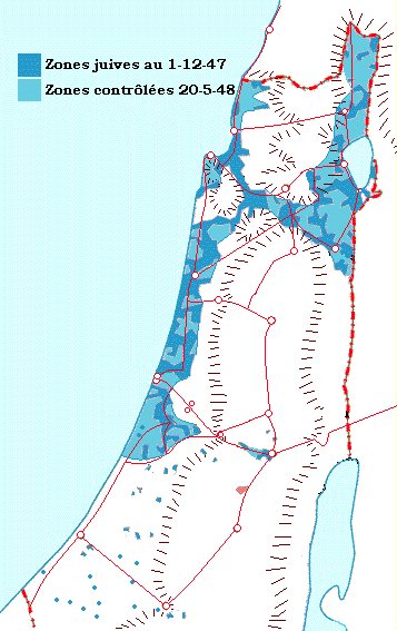 Zones contrôlées par les forces juives au moment de l'entrée en guerre de pays arabes. Carte réalisée par moi-même en me basant sur les indications données dans Yoav Gelber, Palestine 1948, 2006 et Benny Morris, The Birth of the Palestinian Refugee Problem Revisited, 2003. Ceedjee contact 21 décembre 2006 à 00:44 (CET)